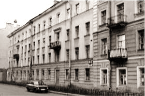 Laboratorio di dinamite di Narodnaja volja in via Telescnaja